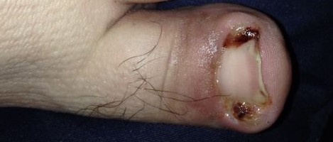 Dit del peu gros infectat